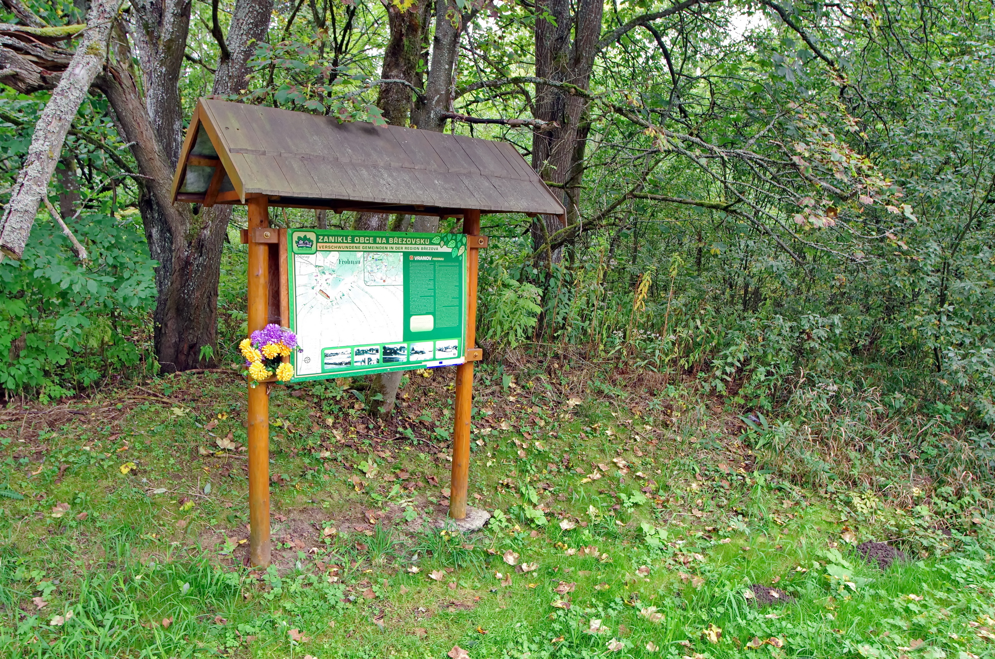 informační panel v místě zaniklé obce Vranov u Rovné, Slavkovský les, okres Sokolov